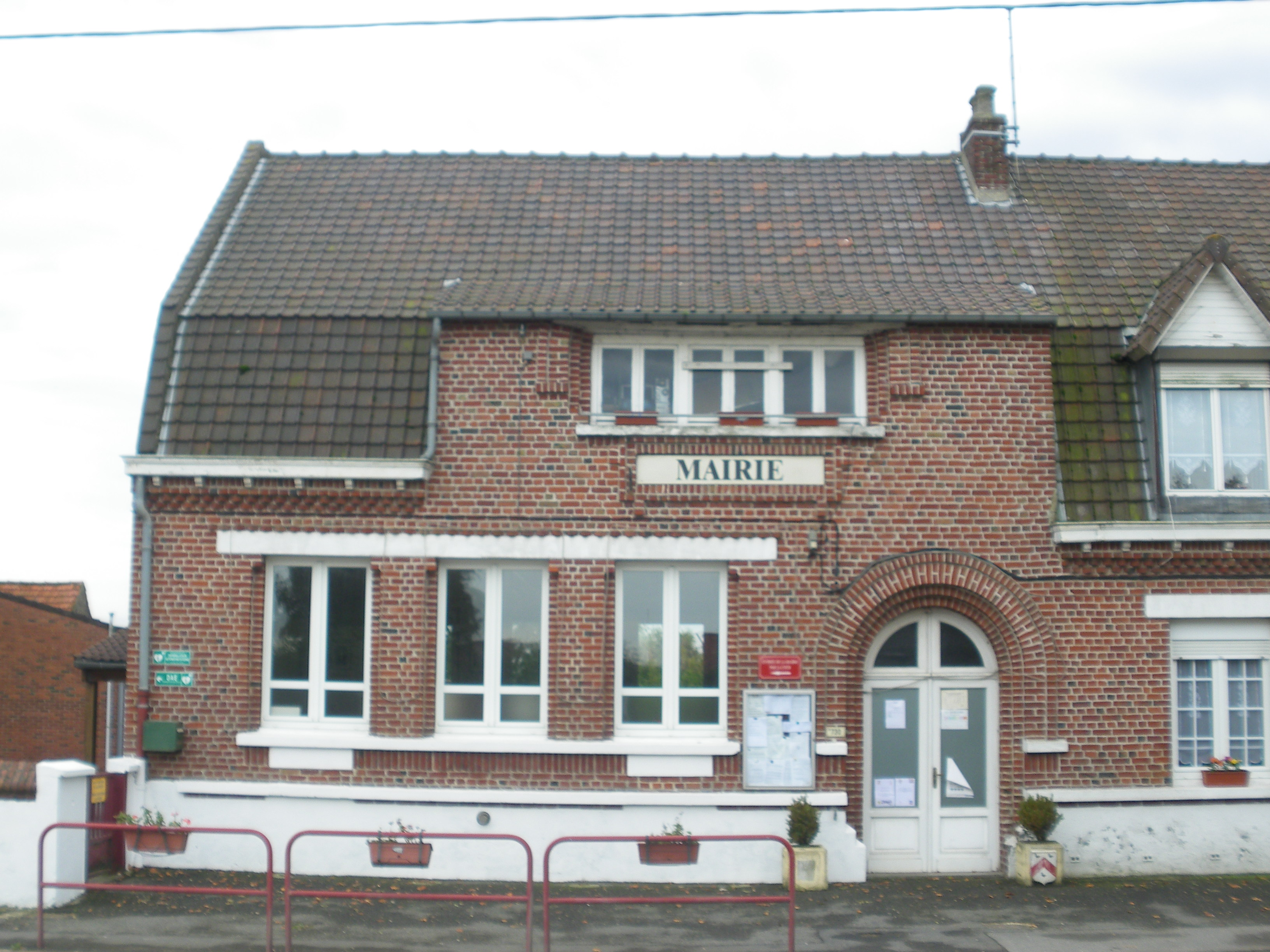 Vue de la mairie de Pradelles dans le Nord.